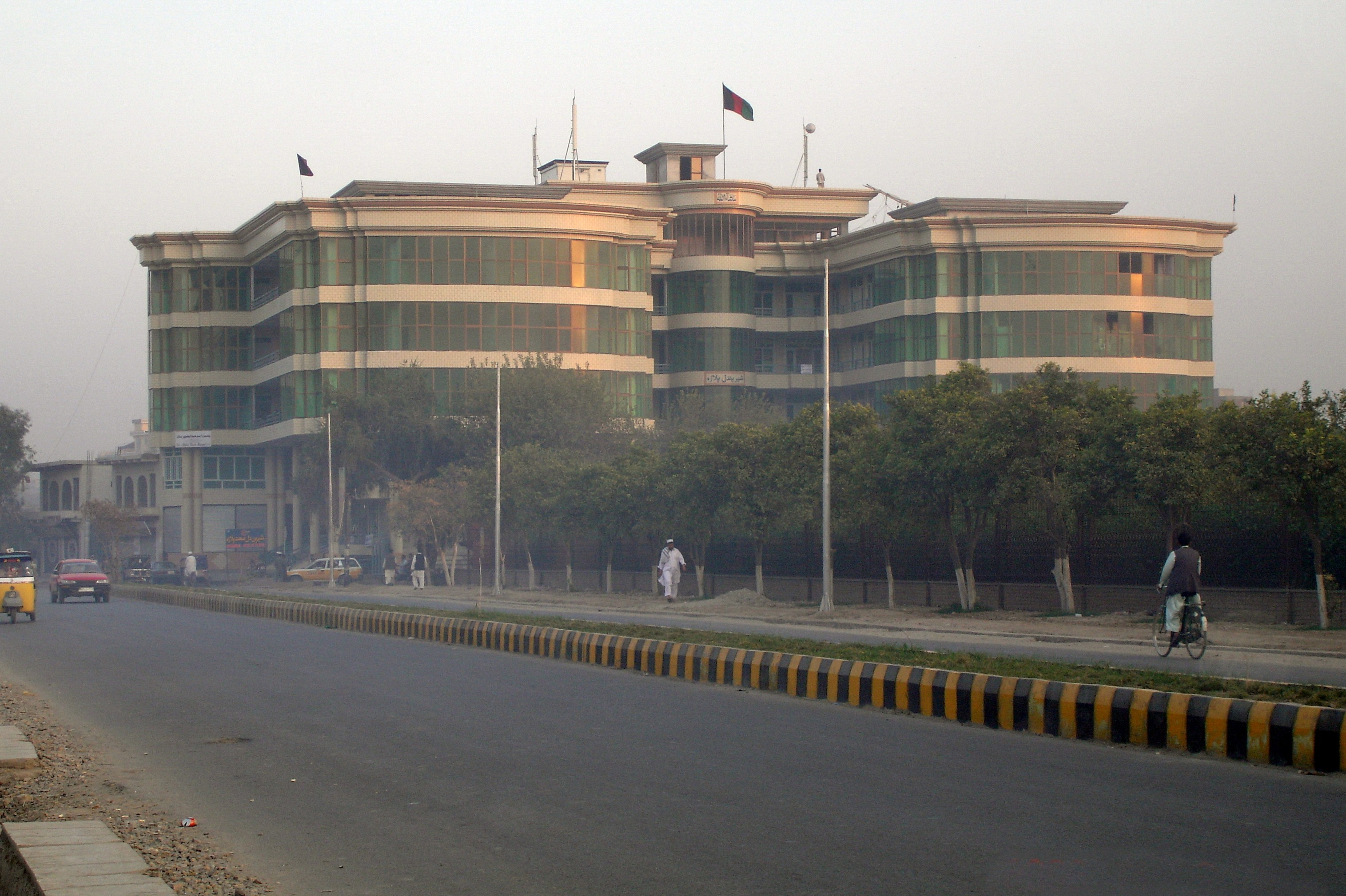 Jalalabad